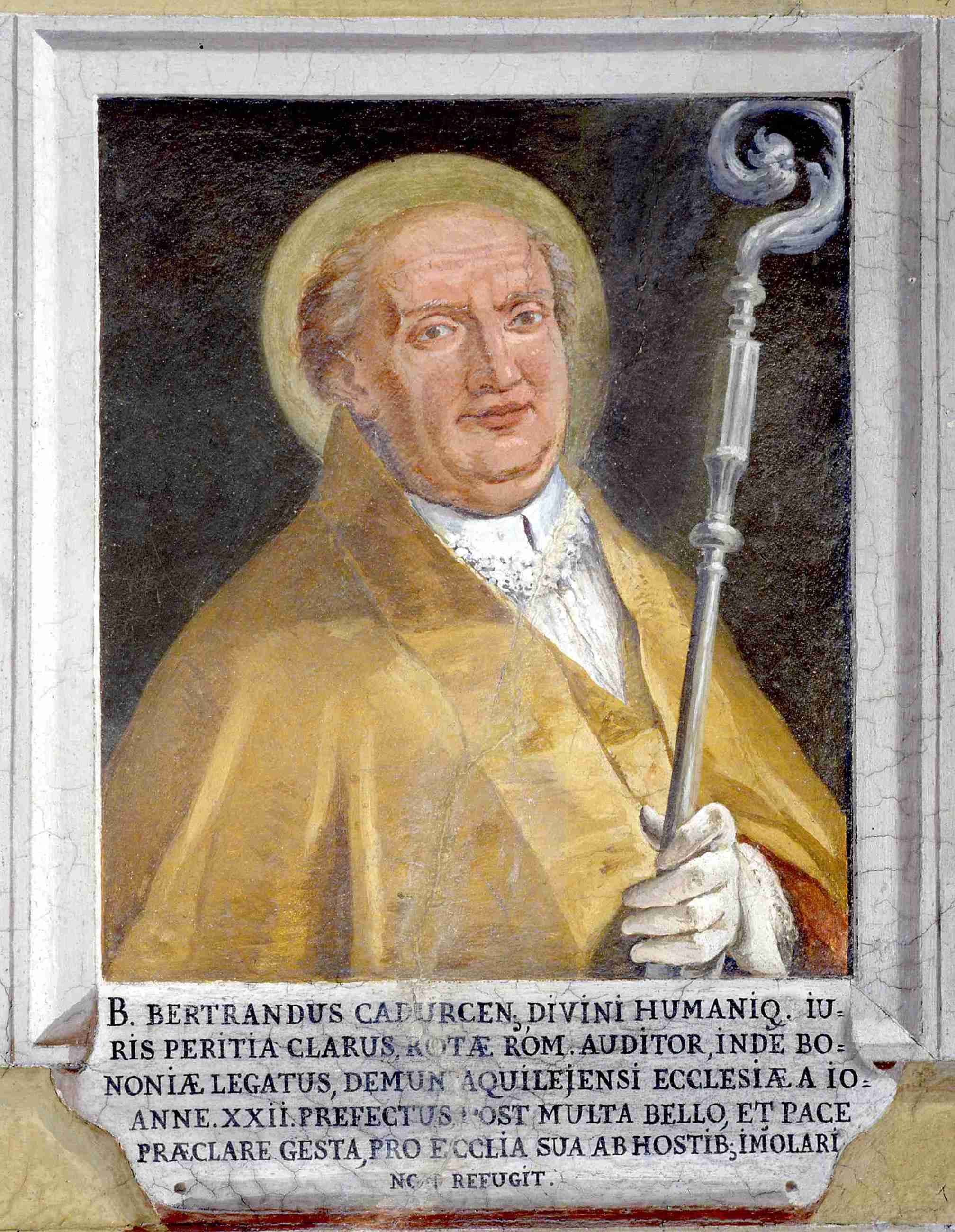 Beato-Bertrando-Patriarcato Udine